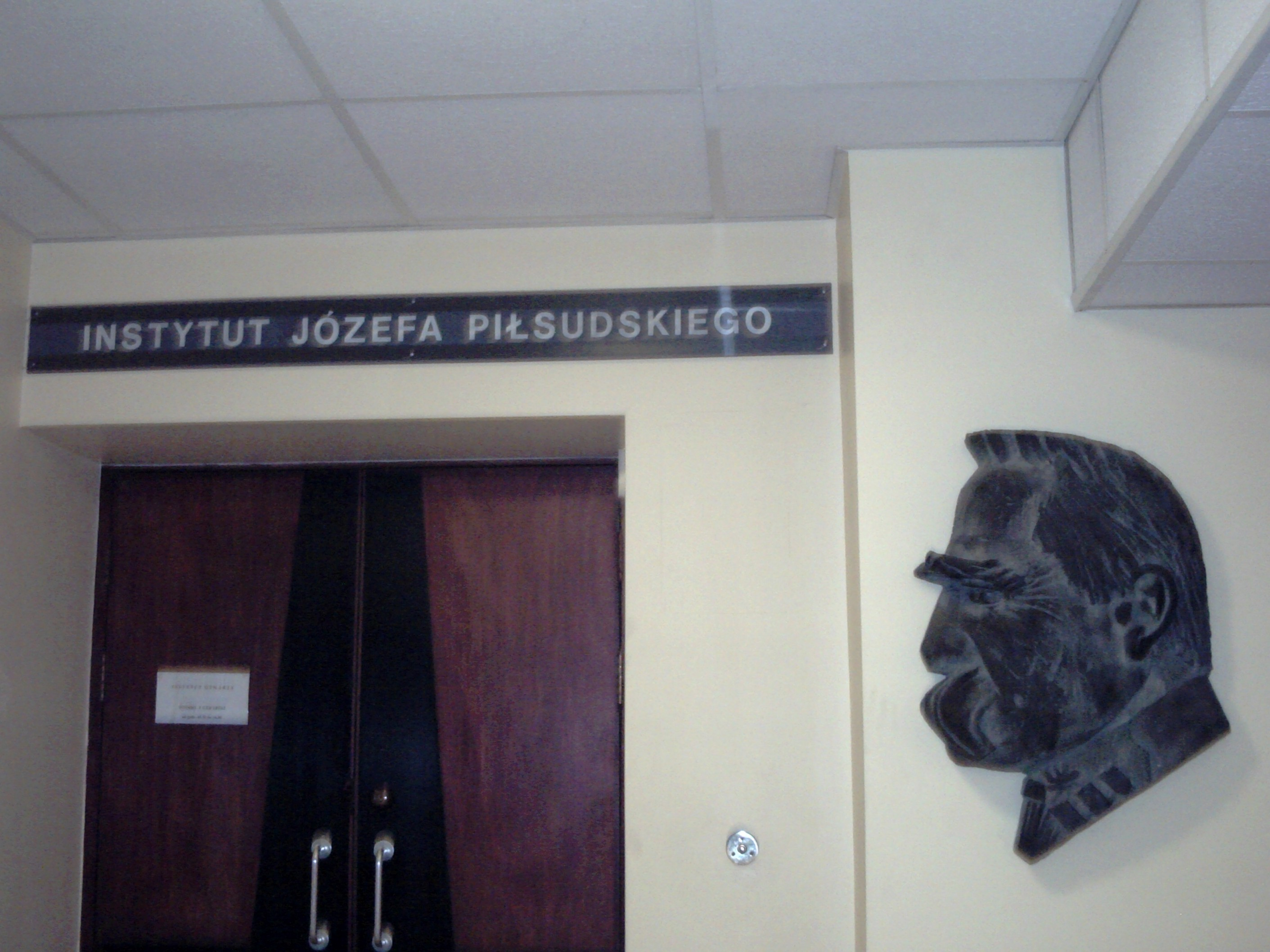 Wejście do Instytutu Józefa Piłsudskiego w Londynie